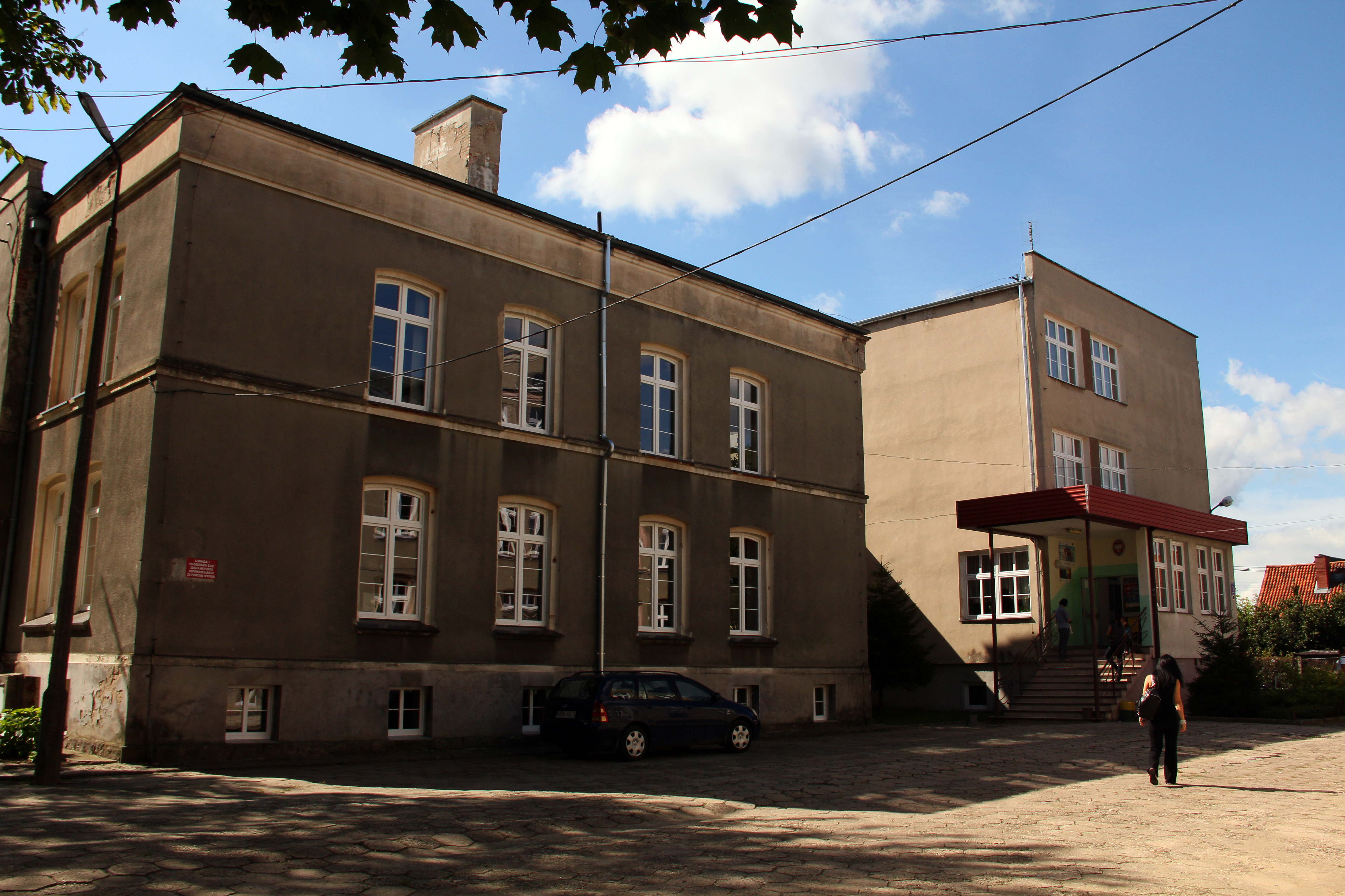 Budynek Zespołu Szkół Ponadgimnazjalnych nr 2 w Bartoszycach.